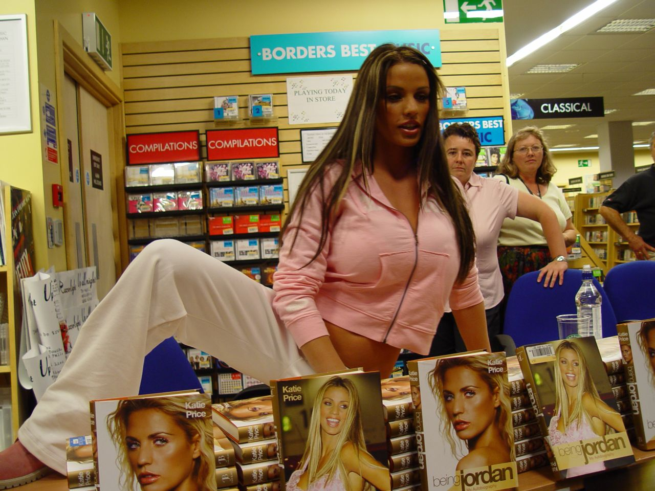 Katie Price (Jordan) at booksigning